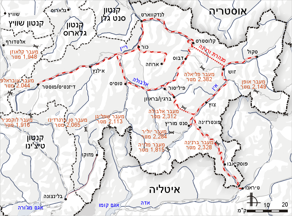 Darstellung zeigt dsa Netz der Rhätischen Bahn. Zeichnung erstellt 2004 von Benutzer:Sansculotte. Bild ist unter der GNU FDL zur weiteren Verwendung freigegeben. Quellenangabe und Beleg an erbeten.